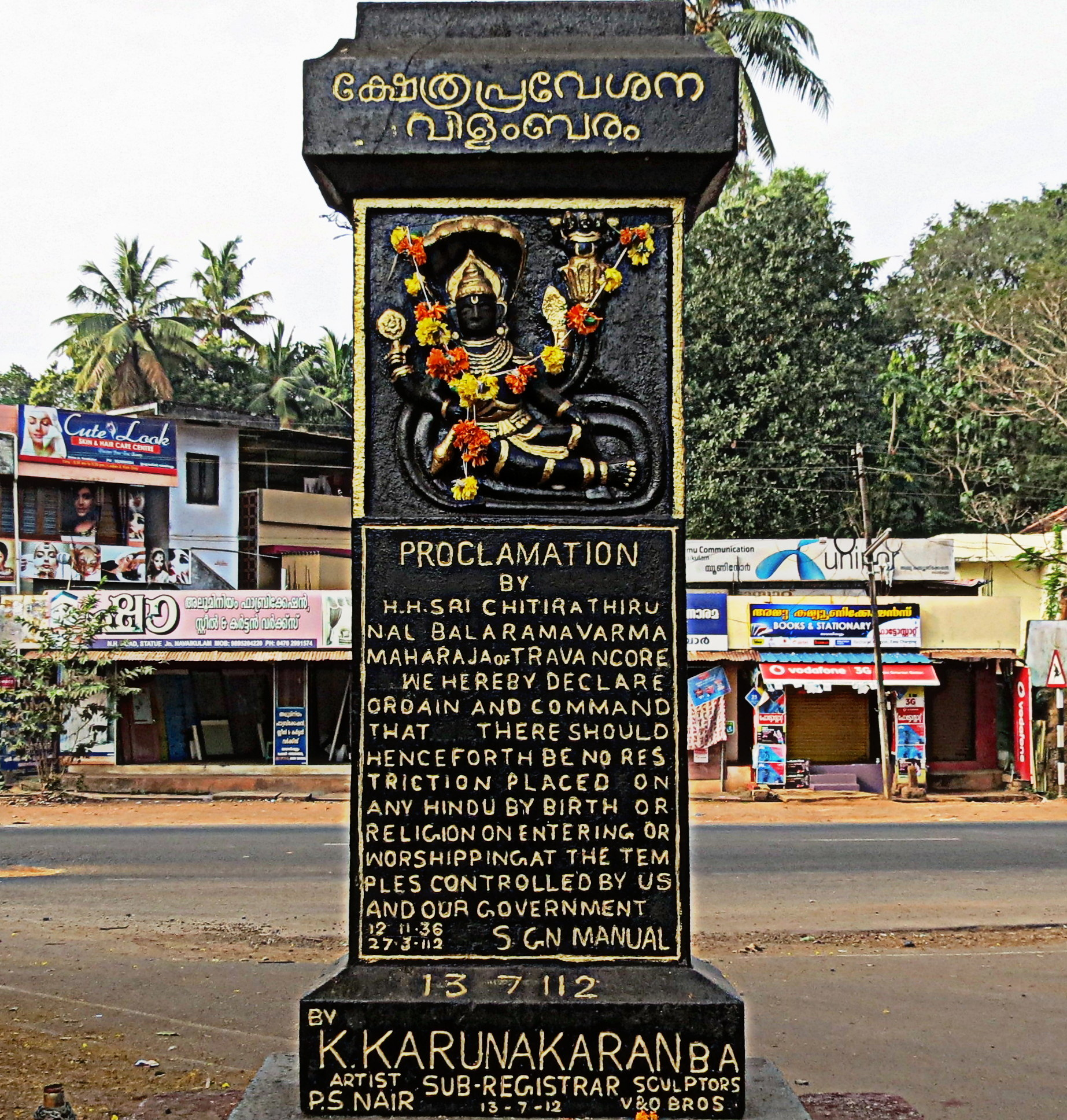 തിരുവനന്തപുരം ജില്ലയില്‍ നാവയിക്കുളത്തുള്ള ക്ഷേത്ര പ്രവേശന വിളംബര സ്തൂപമാണ് ചിത്രത്തില്‍